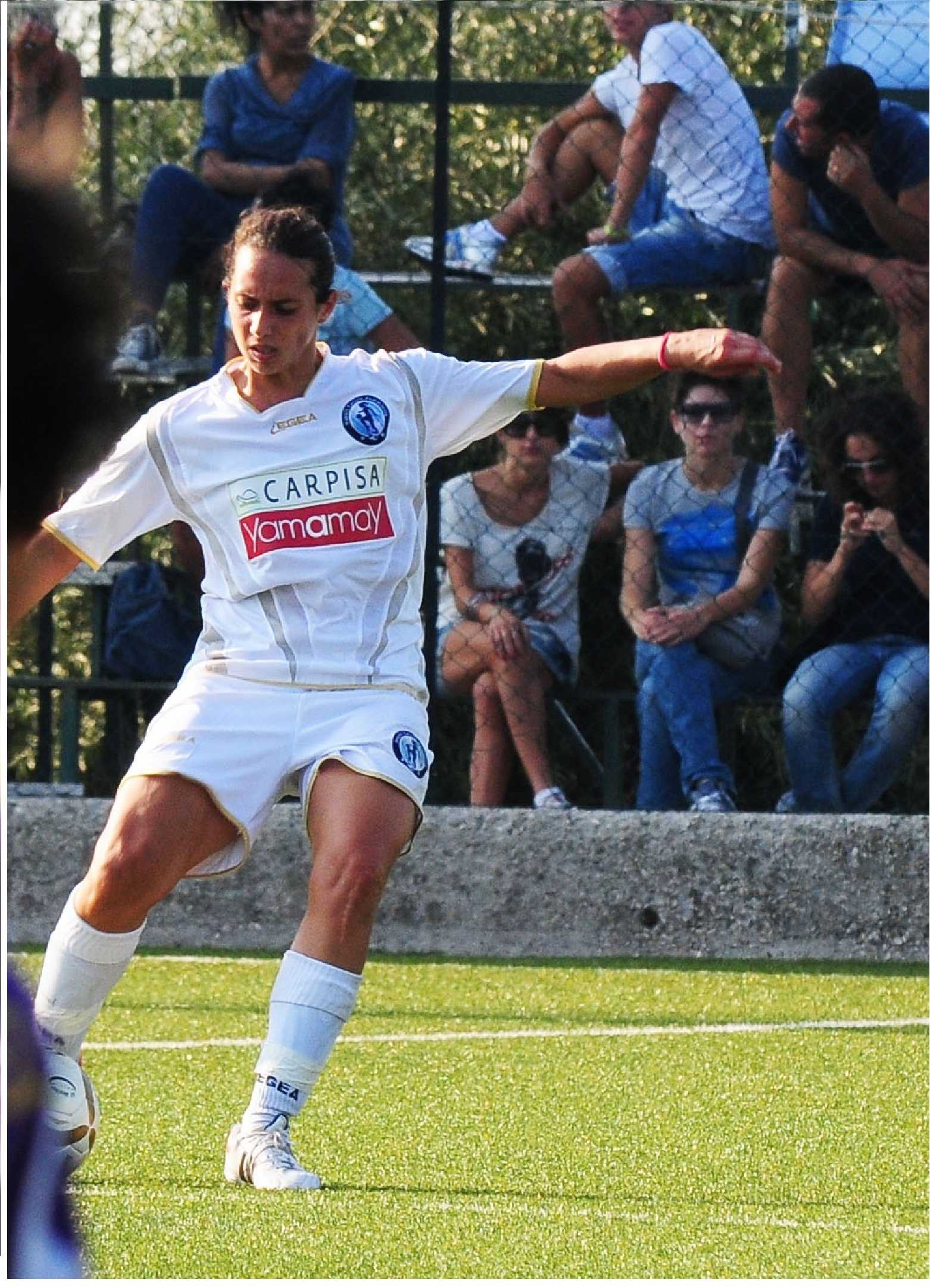 Lara Barbieri con la maglia del Napoli Calcio Femminile